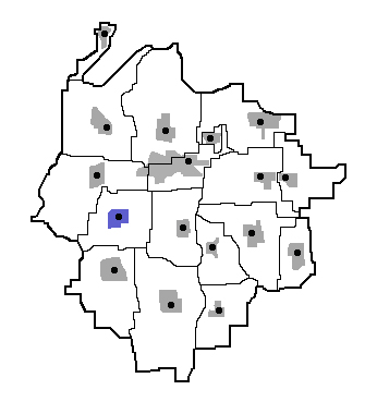 Lagekarte von Liedingen in der Gemeinde Vechelde